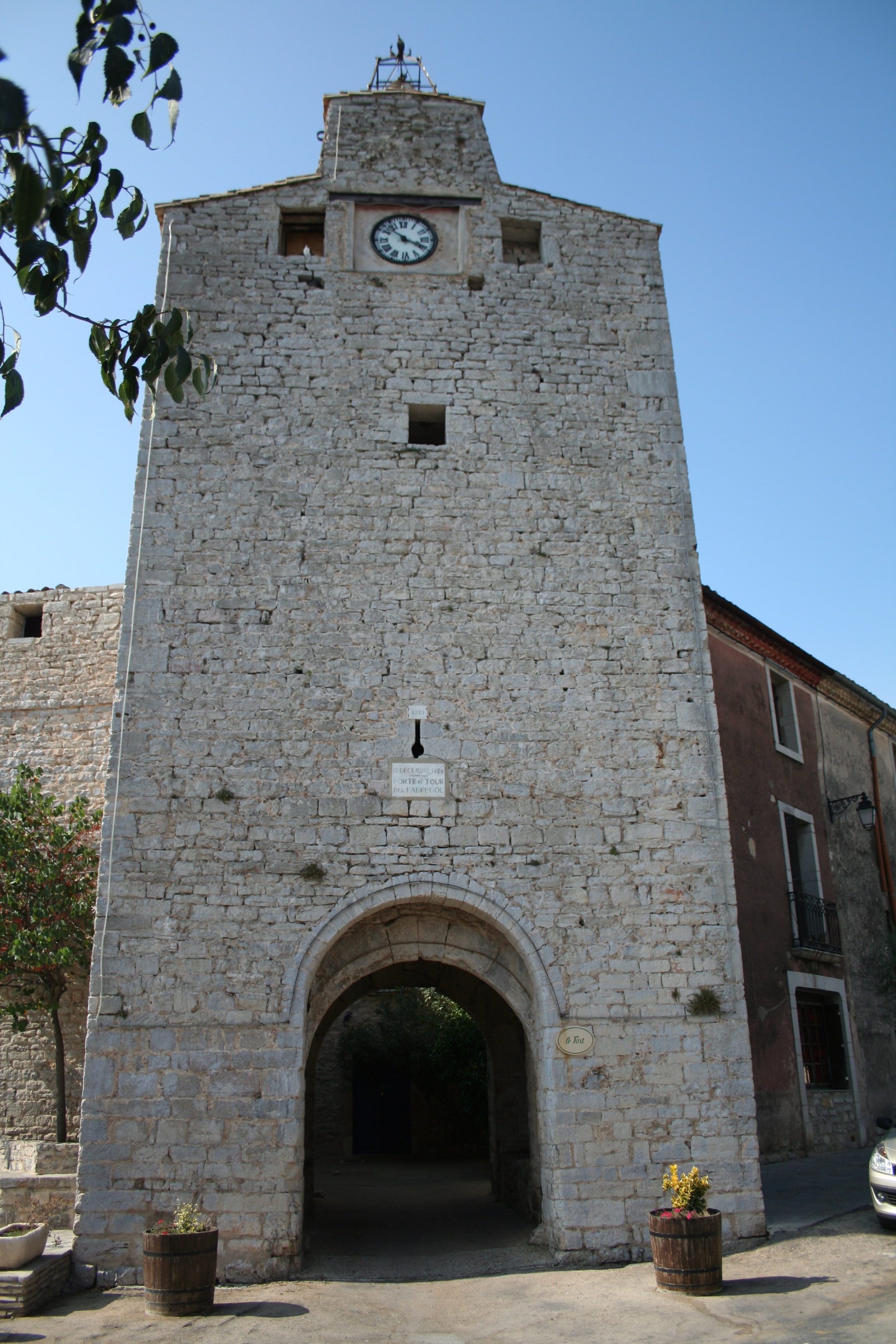 Viols-le-Fort (Hérault) - Porte du Fabregol.